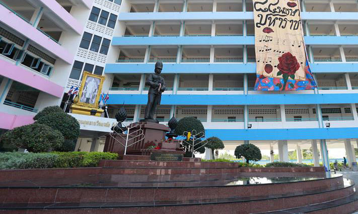 พระบรมราชานุสาวรีย์พระบาทสมเด็จพระจุลจอมเกล่าเจ้าอยู่หัว โรงเรียนสวนกุหลาบวิทยาลัย รังสิต